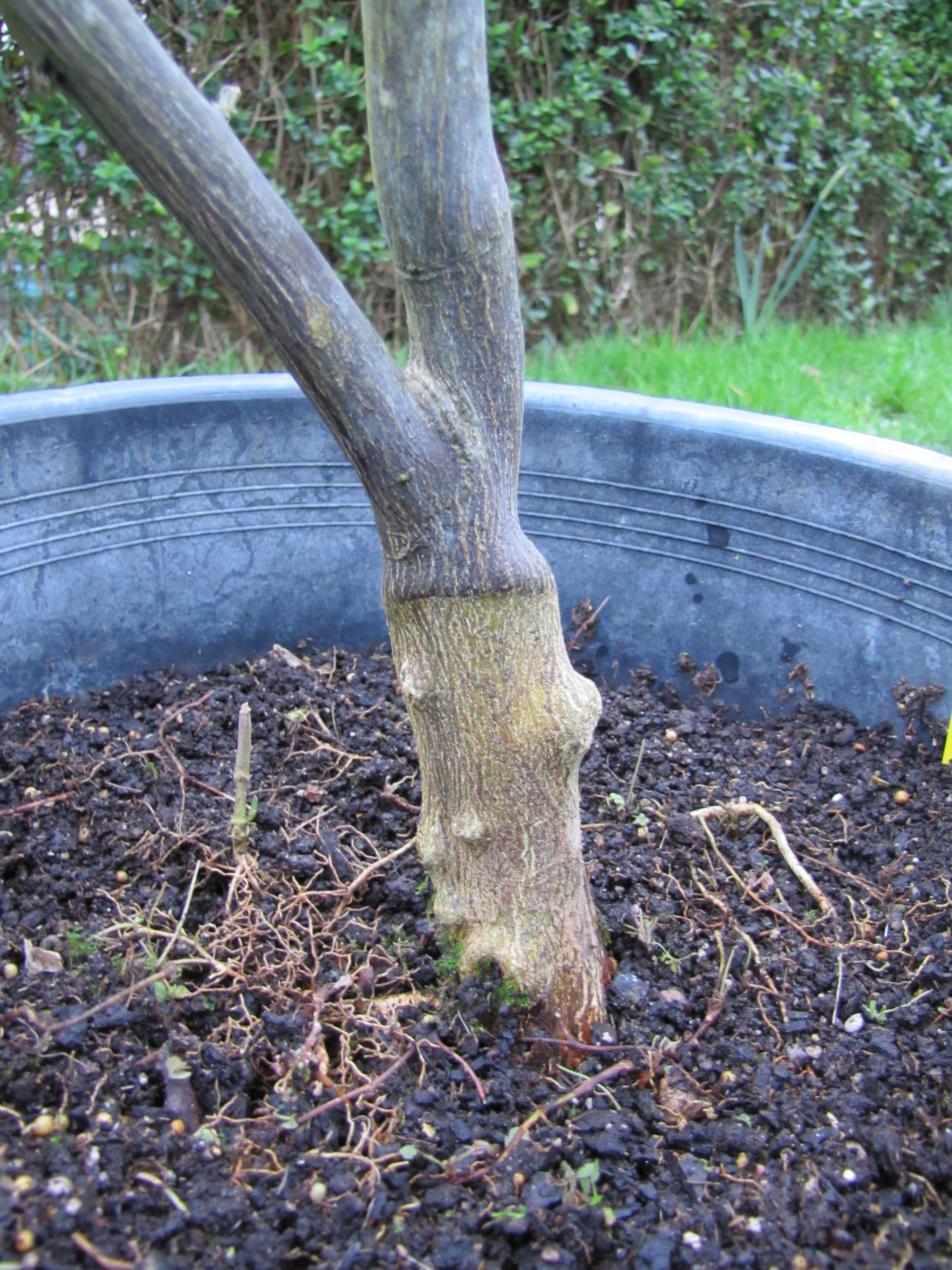 Mandarinier satsuma greffé sur poncirus.